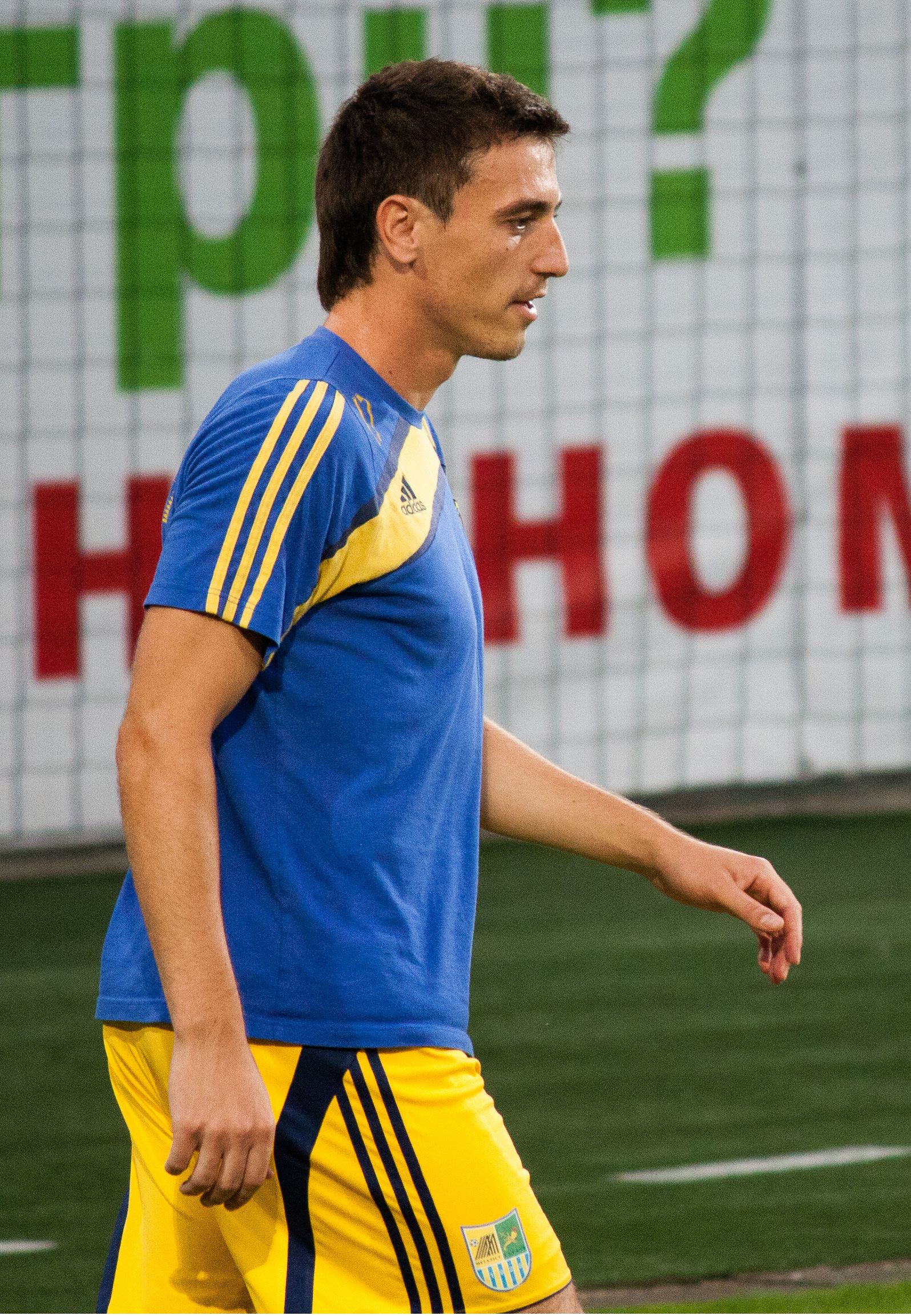 Перед матчем Днепр-Металлист